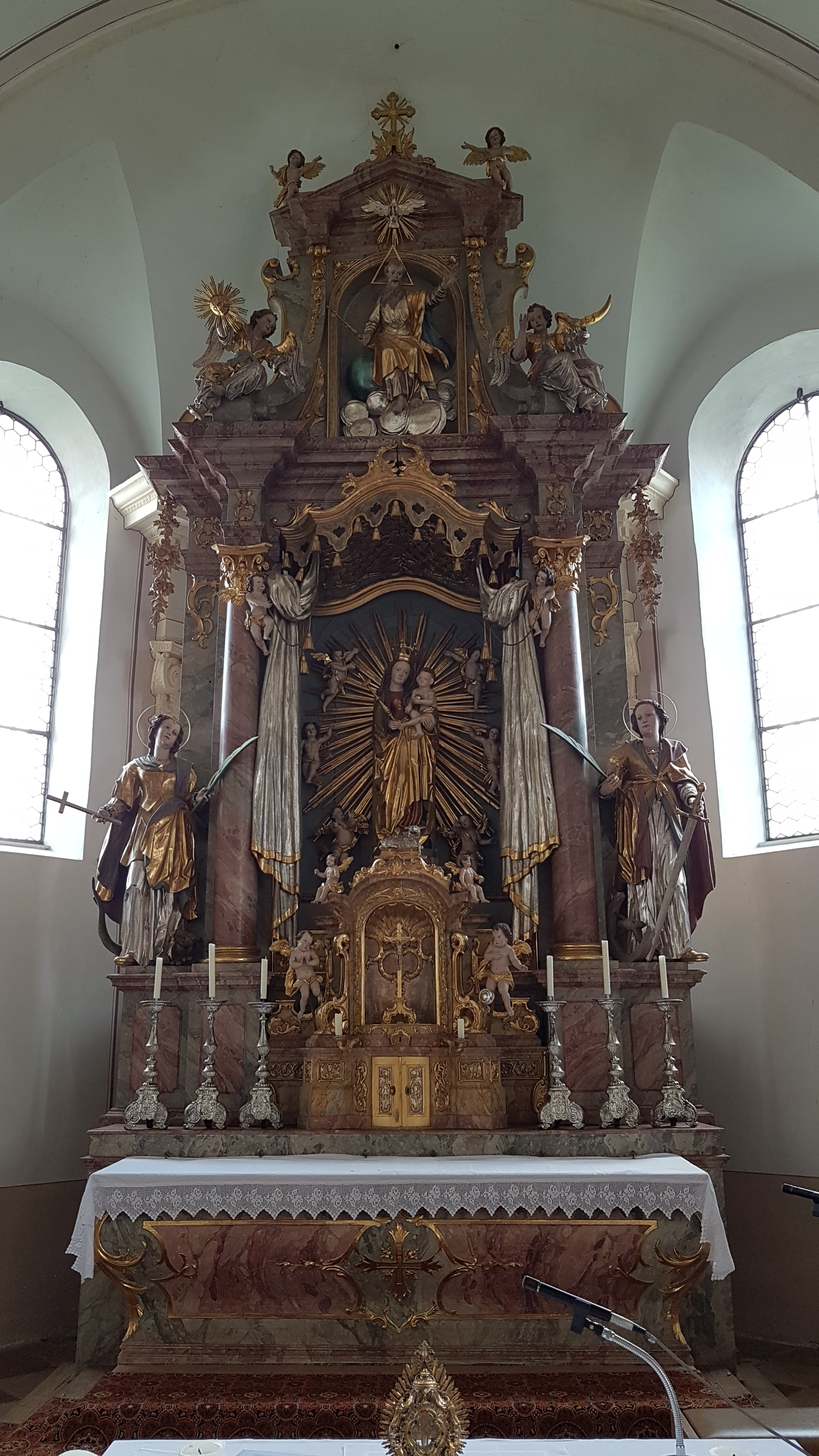 Mariä Geburt (Traunwalchen)